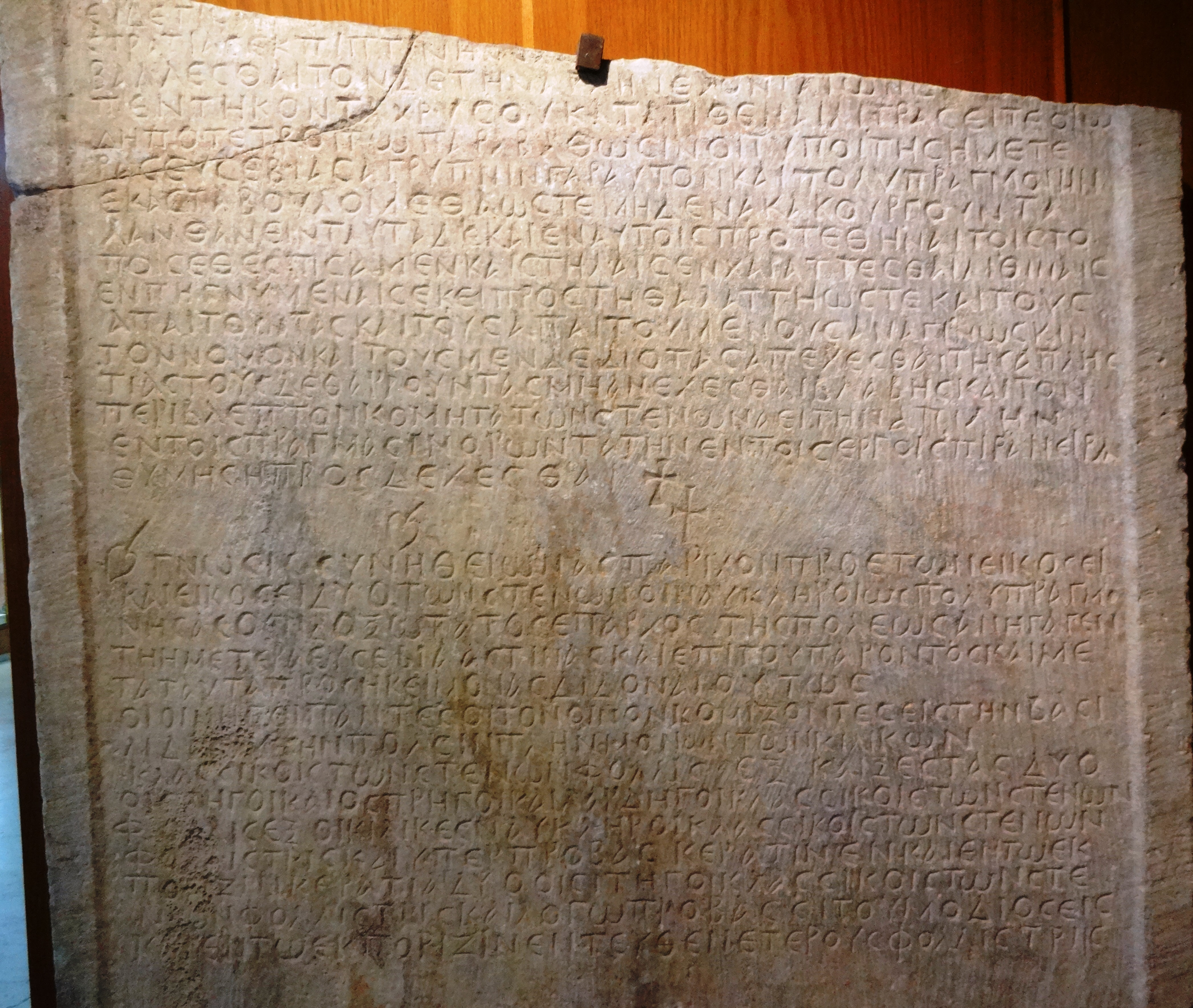 Gesetzestafel des Anastasios I. über die Passage durch die Dardanellen, Archäologisches Museum Istanbul, Inv. 3016 T